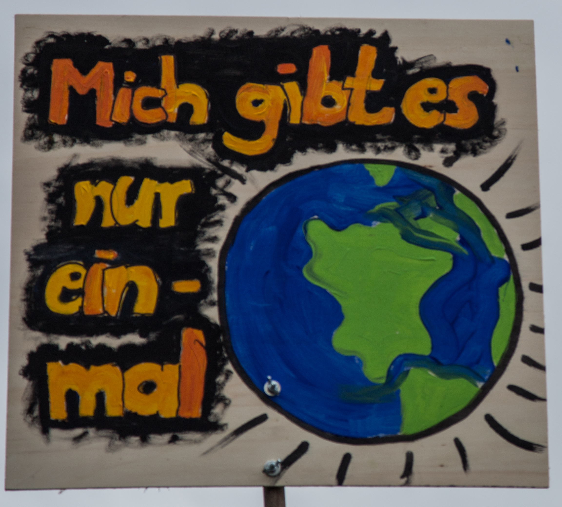 „Mich gibt es nur einmal“. Am 29. November 2015 gingen, anlässlich der Weltklimakonferenz COP21 in Paris, ca. 17.000 Menschen in Berlin auf die Straße um auf dem weltweit stattfindenden Global Climate March für echten Klimaschutz zu demonstrieren. Trägerkreis des Protests in Deutschland waren Avaaz, Campact, Greenpeace, Klima-Allianz, NABU, Oxfam & WWF.